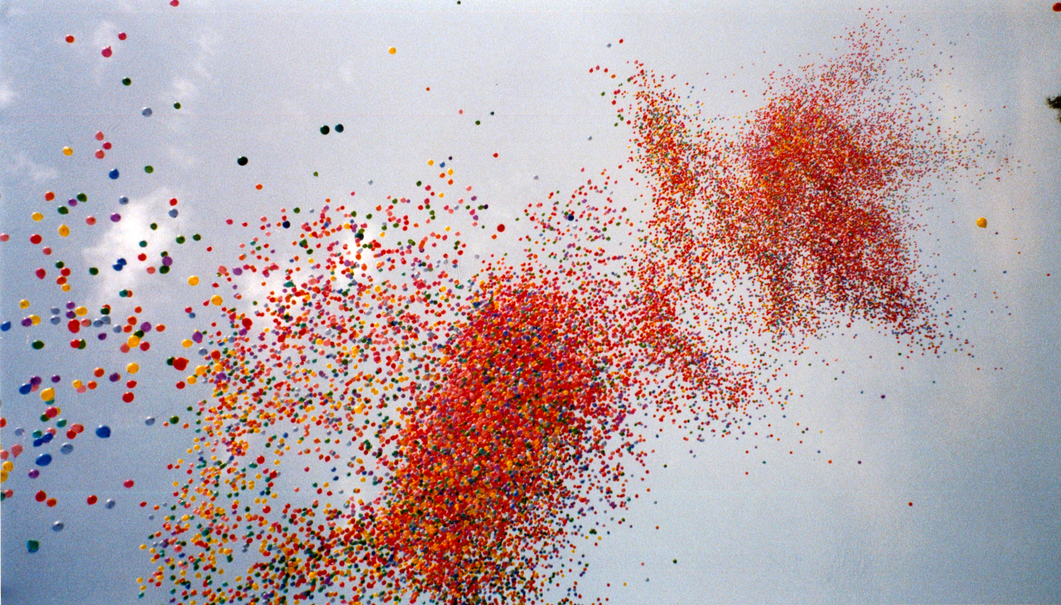 65.000 Ballon mit Helium gefüllt steigen in den Himmel